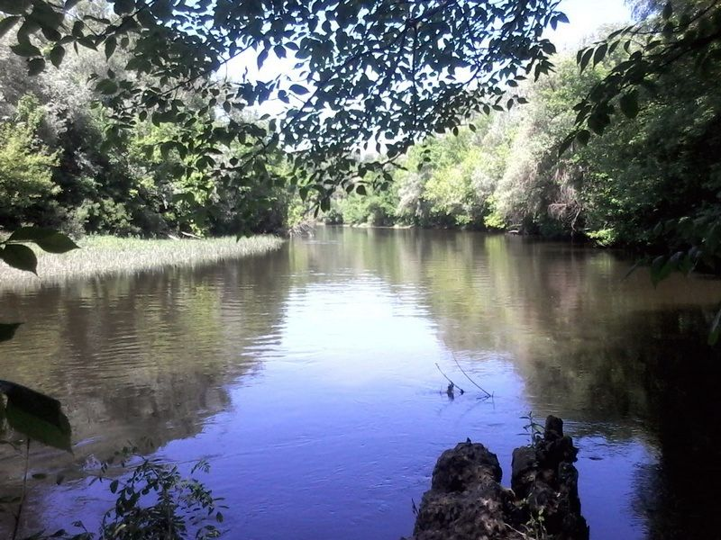 Річка Псел біля села Ламане (Глобинський р-н, Полтавська обл.)